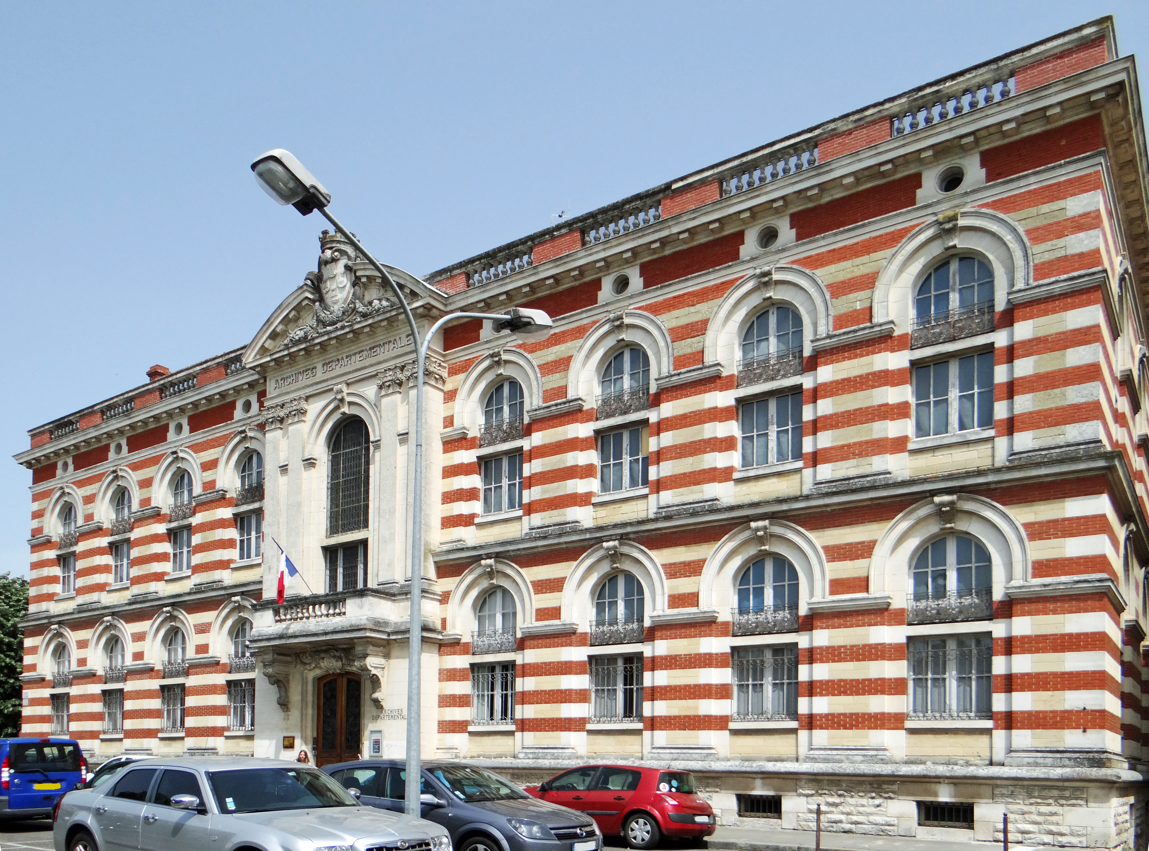 Agen - Archives départementales de Lot-et-Garonne